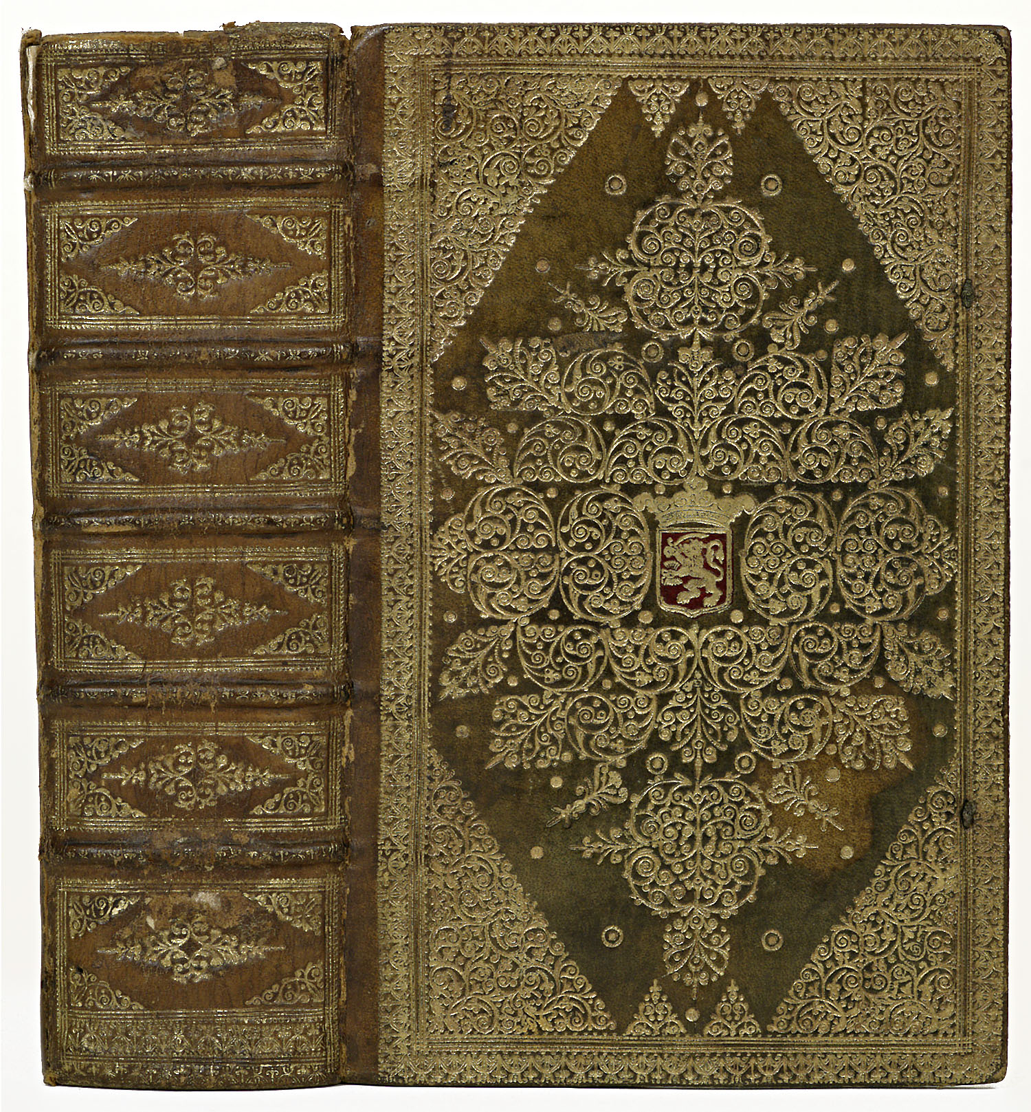 Inhoud: Biblia Hebraica. Accuratissima Notis ... illustrata a Johanne Leusden. Amstelodami, typis et sumptibus Josephi Athias, 1667. 8vo. (Boek en titelblad ook in Hebreeuws).